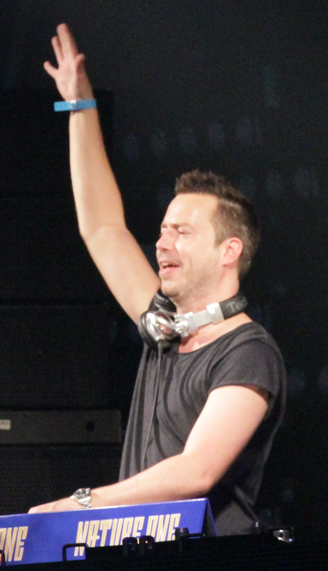 Sander van Doorn am Open Air Floor.